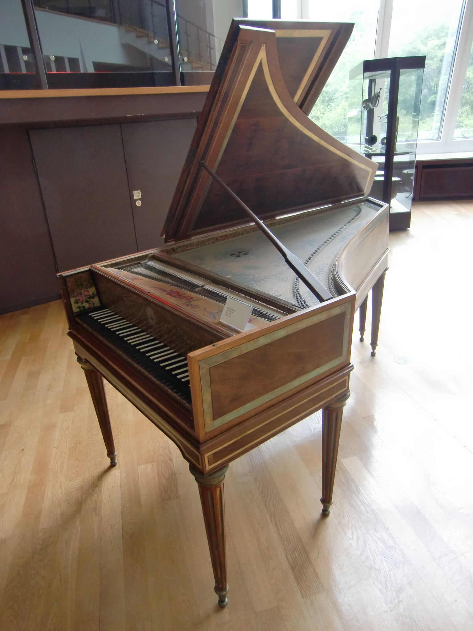 Pianoforte par Pascal Taskin, Paris 1787 - Berlin, Musikinstrumentenmuseum Berlin